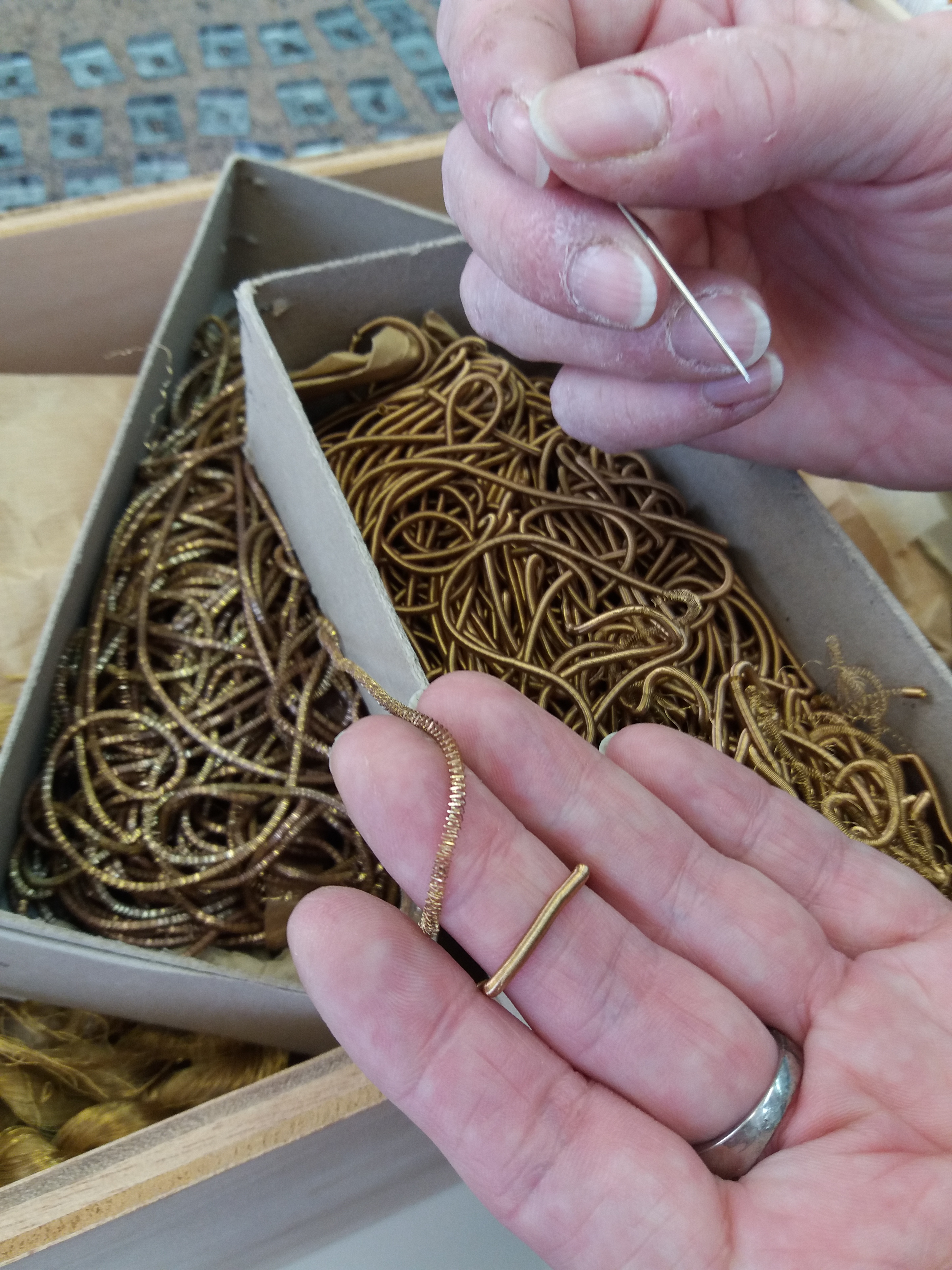 Cannetilles dorées de différentes épaisseurs.